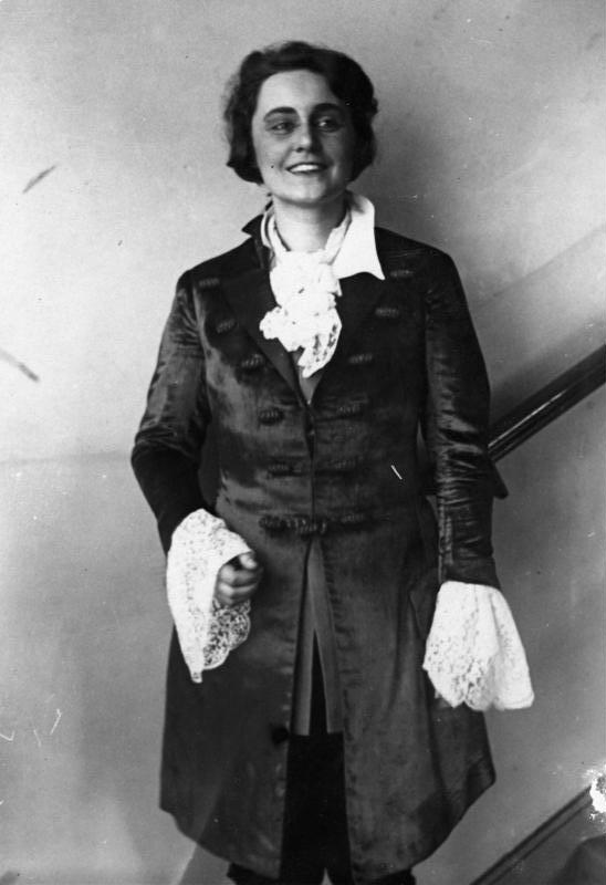 Martha Fuchs Generalprobe Staatsoper "Unter den Linden" - "Der Rosenkavalier" Martha Fuchs in der Deutschen Staatsoper. Abgebildete Personen: Fuchs, Martha: Sopranistin an der Staatsoper Unter den Linden Berlin, Deutschland